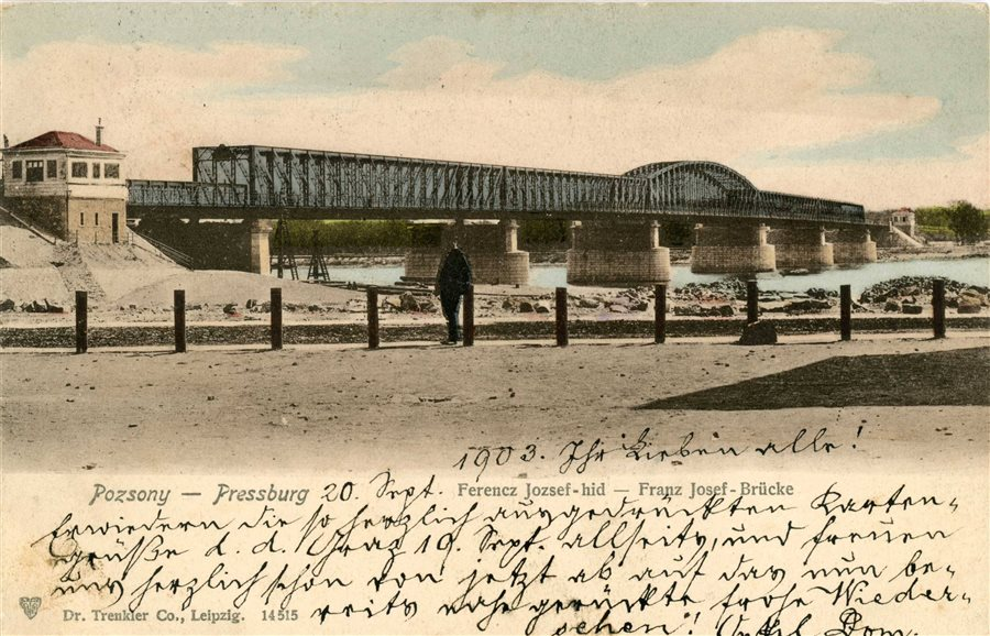 Preßburg; Ansichtskarte von Dr. Trenkler Co., Leipzig